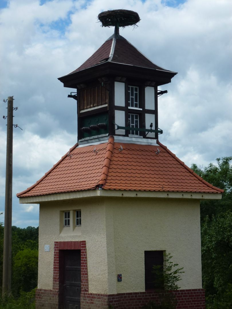 Storchennest auf ehem. Trafostation in Saasdorf